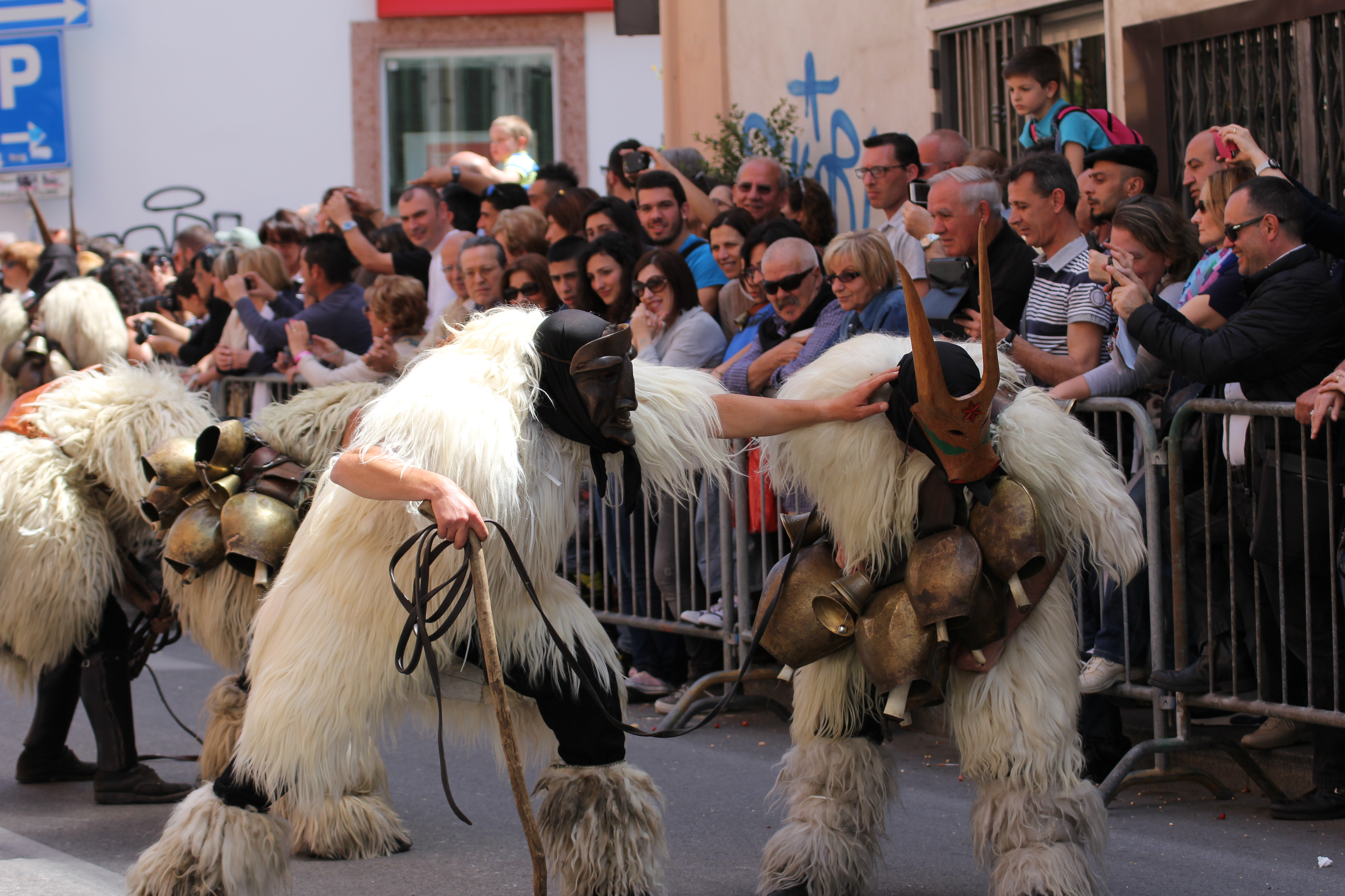 Costume tradizionale